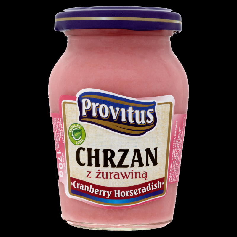 produit de commerce